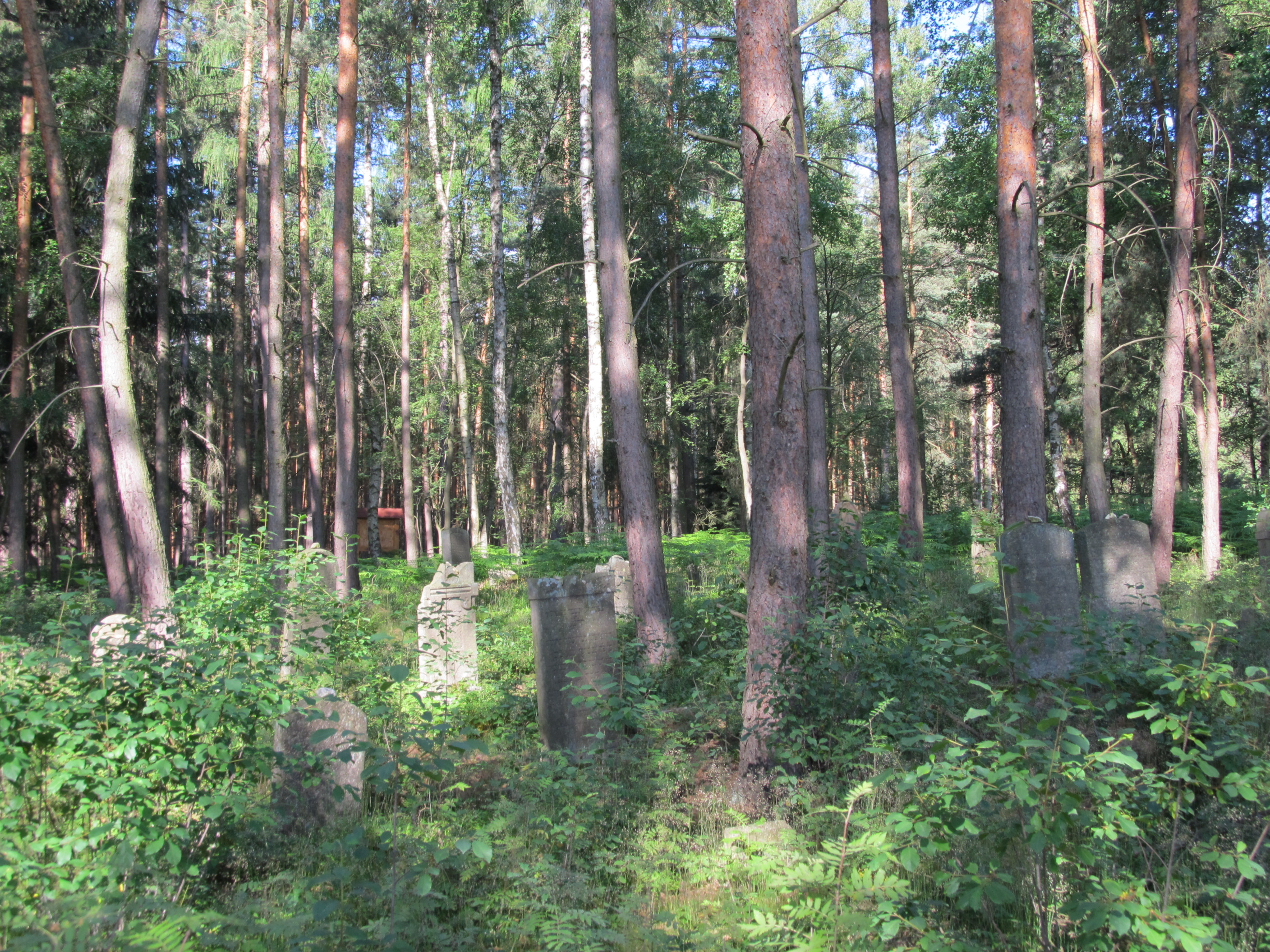 Židovský hřbitov Lomnička